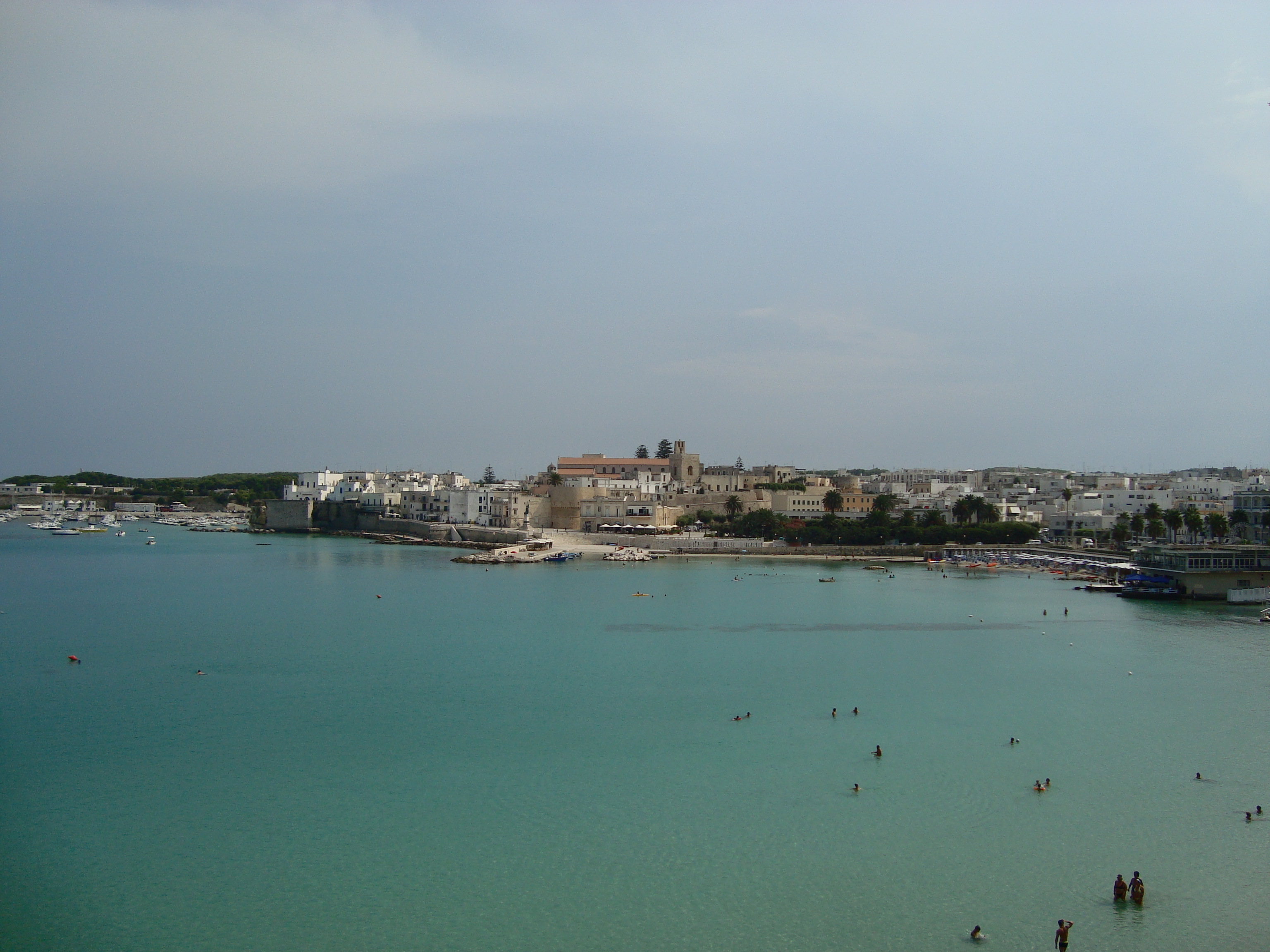 Vue générale du port d'Otrante